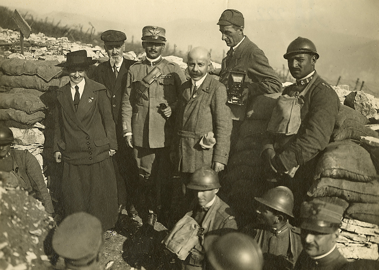 Des soldats italiens sur un théâtre militaire pendant la Première Guerre mondiale.